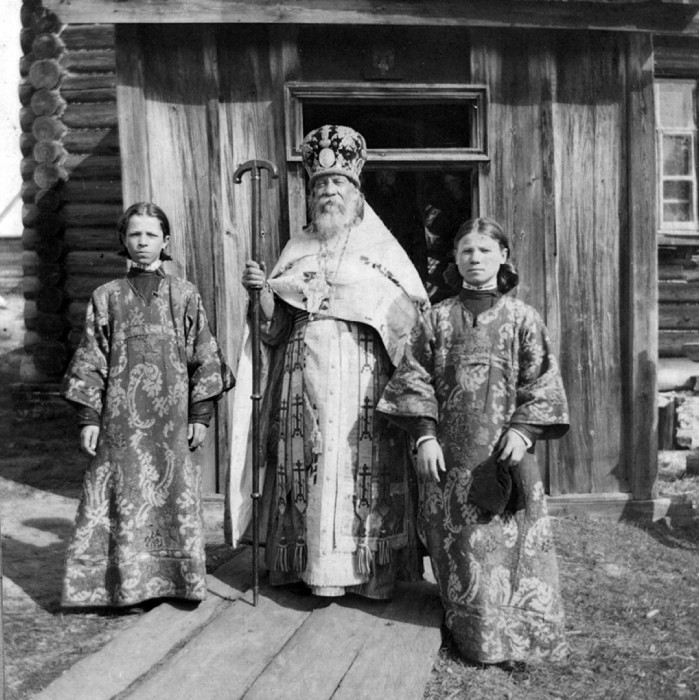 Керженский Благовещенский единоверческий монастырь. Настоятель архимандрит Филарет со стрихарными. Место съемки: Семеновский уезд, Нижегородская губерния Место хранения: Архив аудиовизуальной информации Нижегородской области